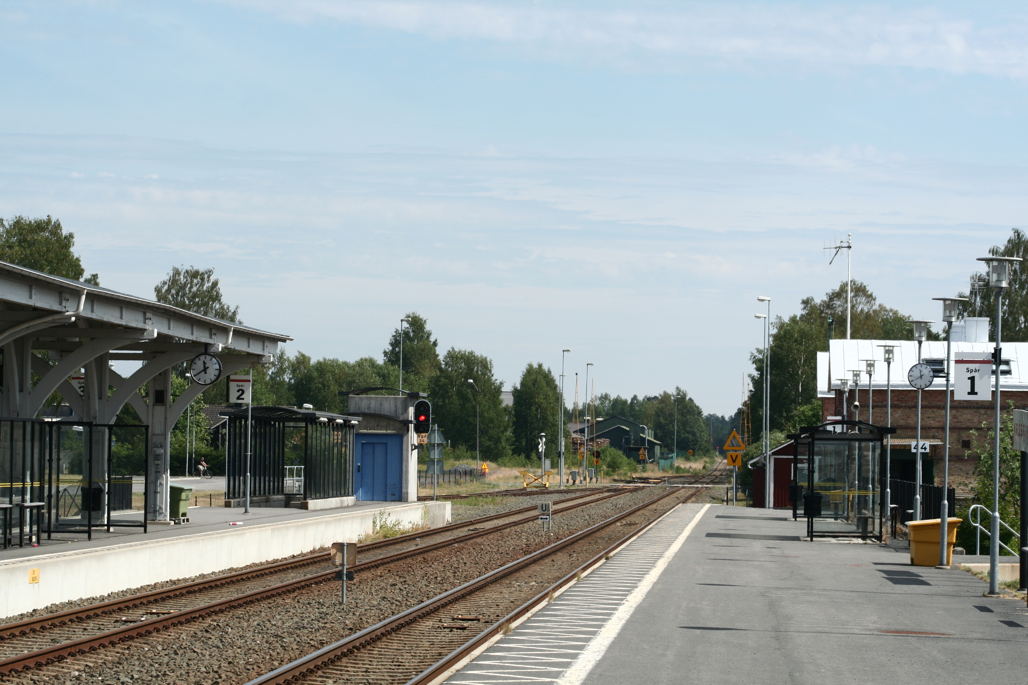 Stationsmiljön i Vaggeryd längs Halmstad - Nässjö Järnväg. Stationen byggdes om nästan helt 1997.